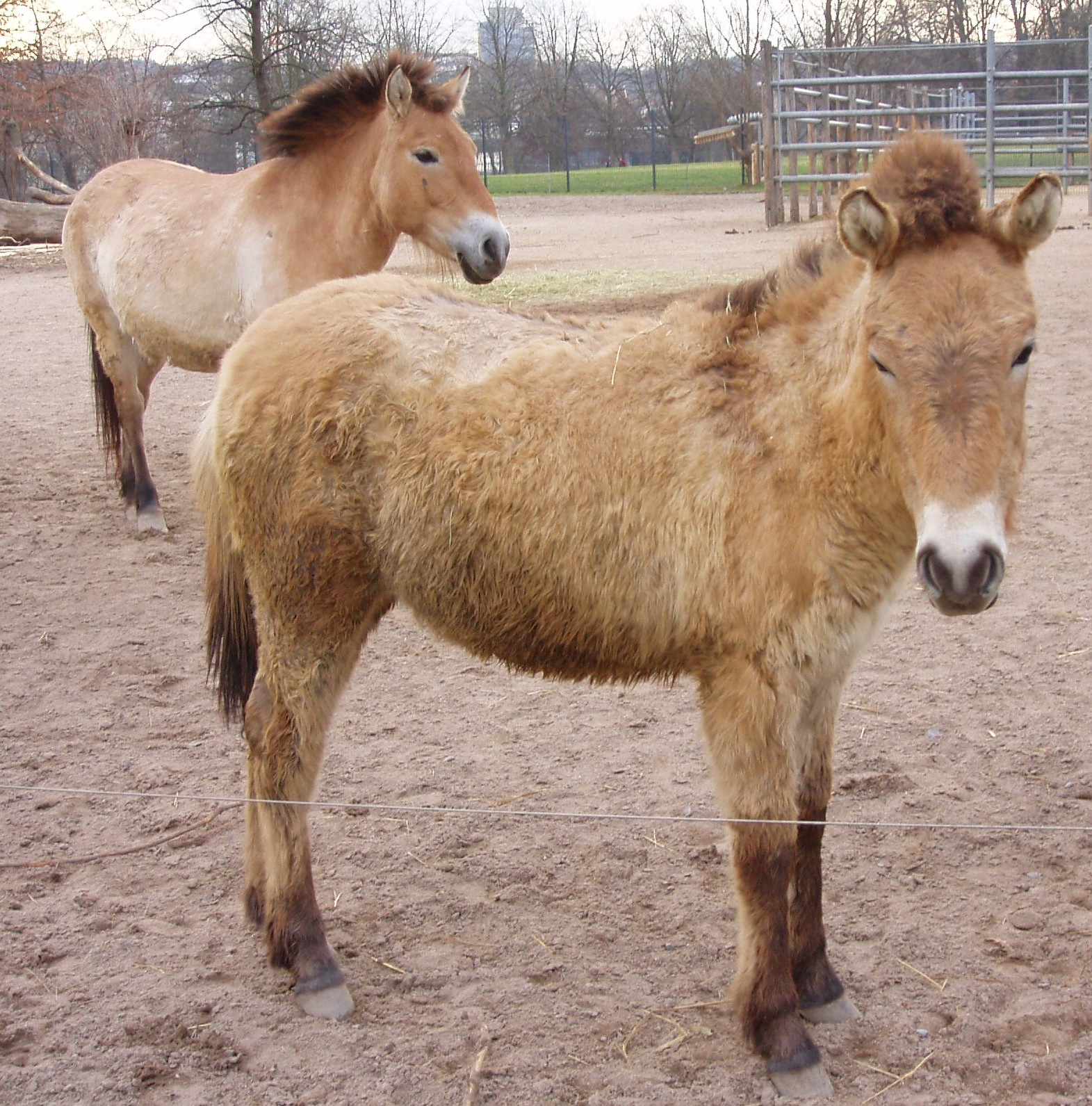 Przewalskipferd in der Wilhelma